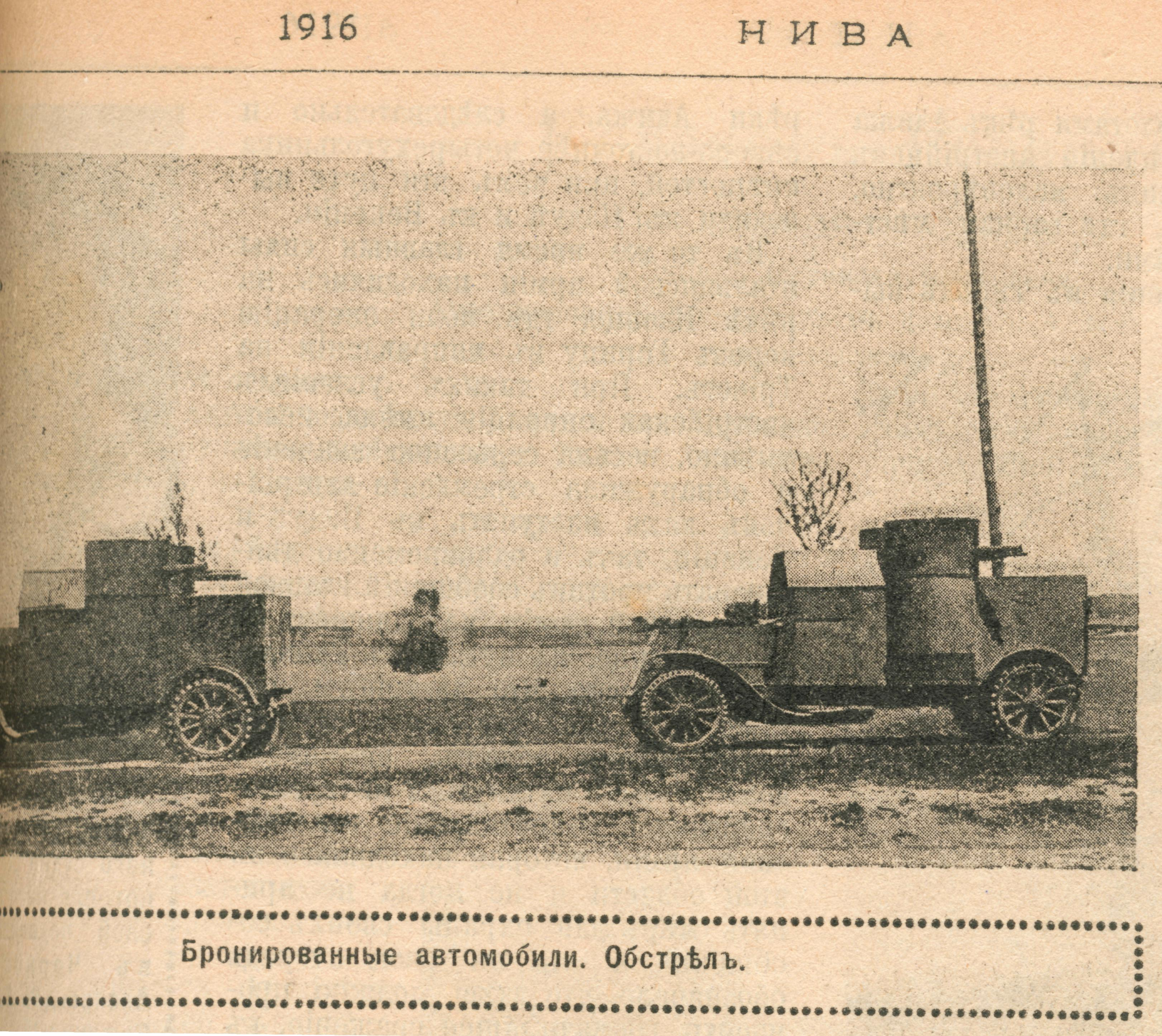 Austin armoured cars (1st series) near Dvina river in Russia, WWI. Бронеавтомобили Остин Русской Императорской армии на реке [Западная] Двина без кормового поста управления ведут огонь по германским войскам. 1916.